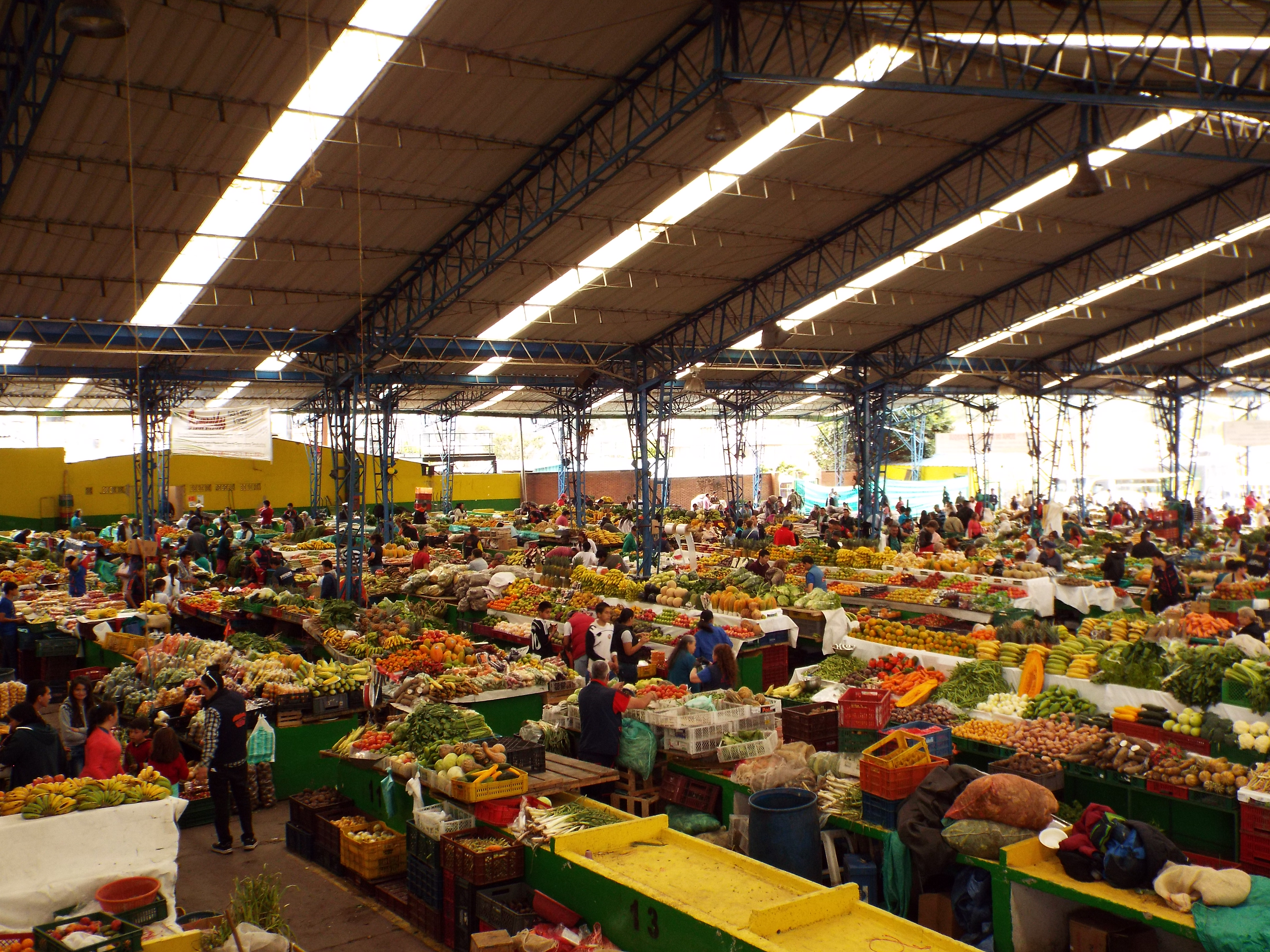 el mercado de alimentos organicos en chia, cundinamarca colombia. Donde la gente regatea los productos y se relaciona con el granjero